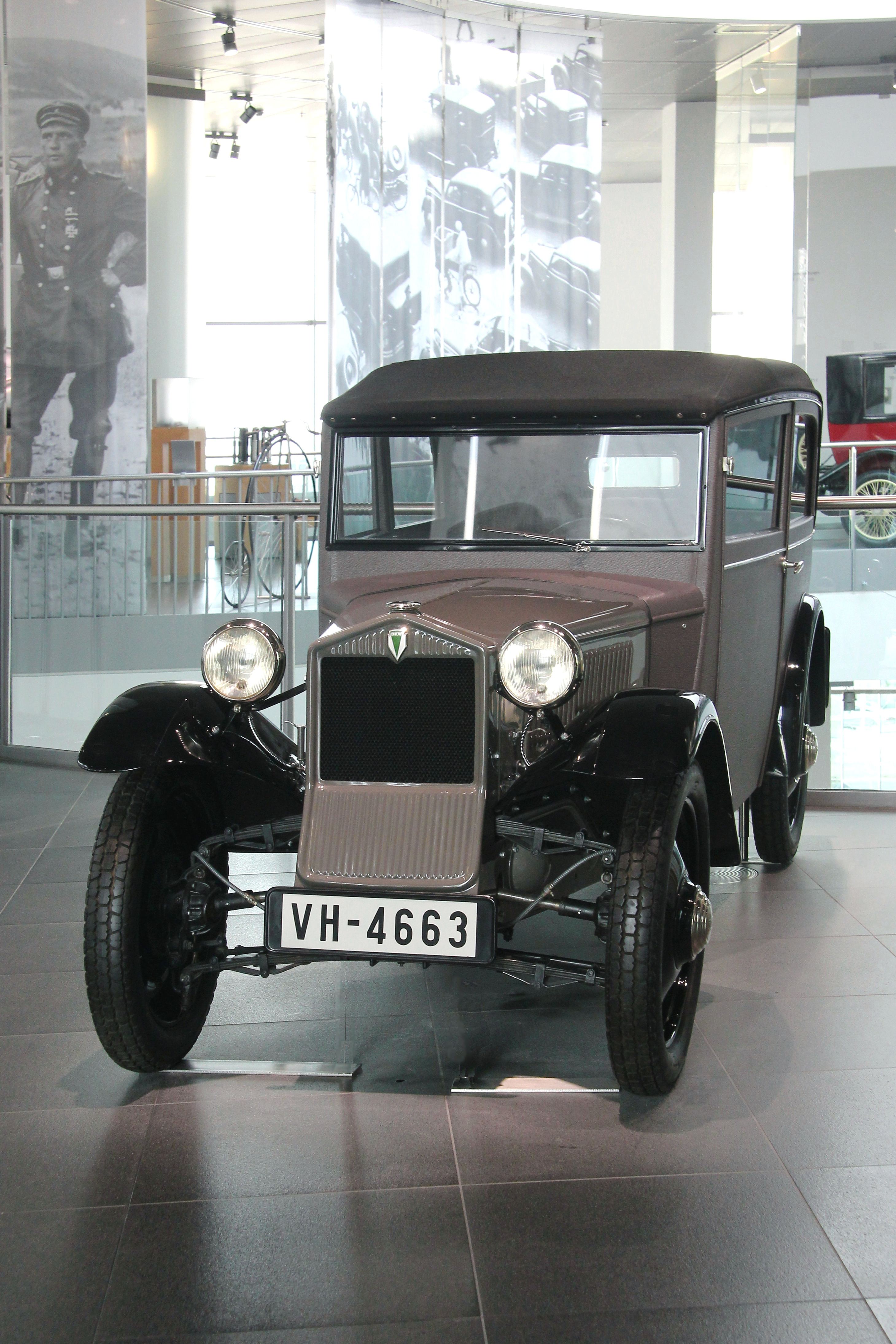 DKW F1 Limousine, kunstlederbezogene Holzkarosserie, Baujahr 1931, erster DKW mit Frontantrieb, im museum mobile in Ingolstadt. Das Auto hatte einen 2-Zylinder-Zweitaktmotor, 494 cm³, 15 PS.